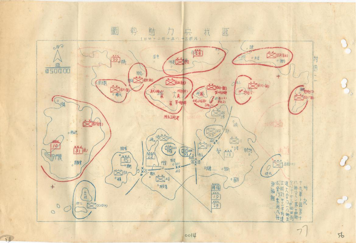 金門戰役前第19軍部署概況